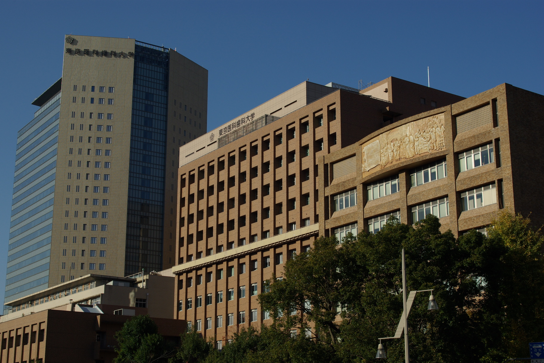 東京医科歯科大学